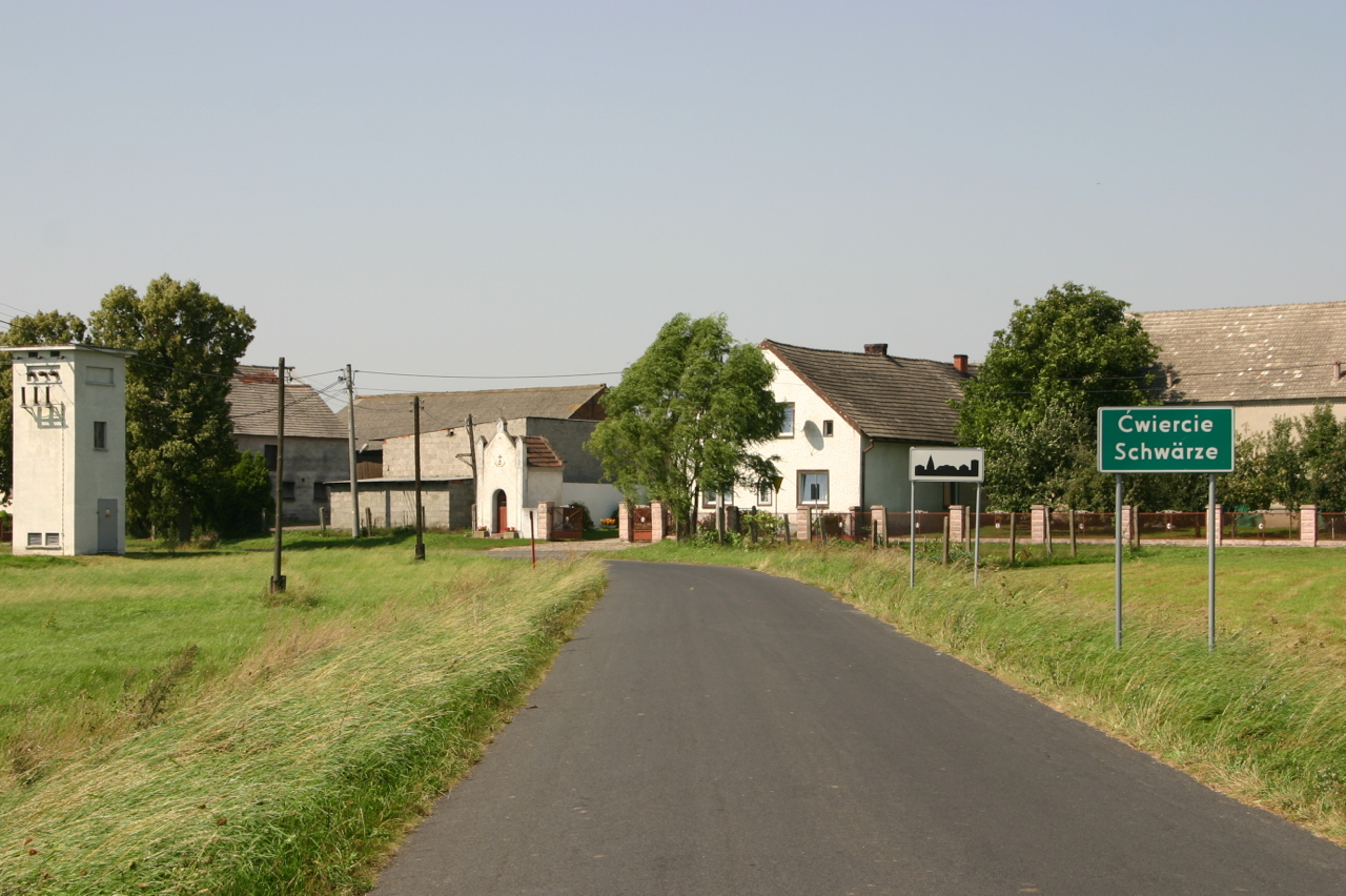 Ćwiercie (dodatkowa nazwa w j. niem. Schwärze) – wieś w Polsce położona w województwie opolskim, w powiecie krapkowickim, w gminie Walce.